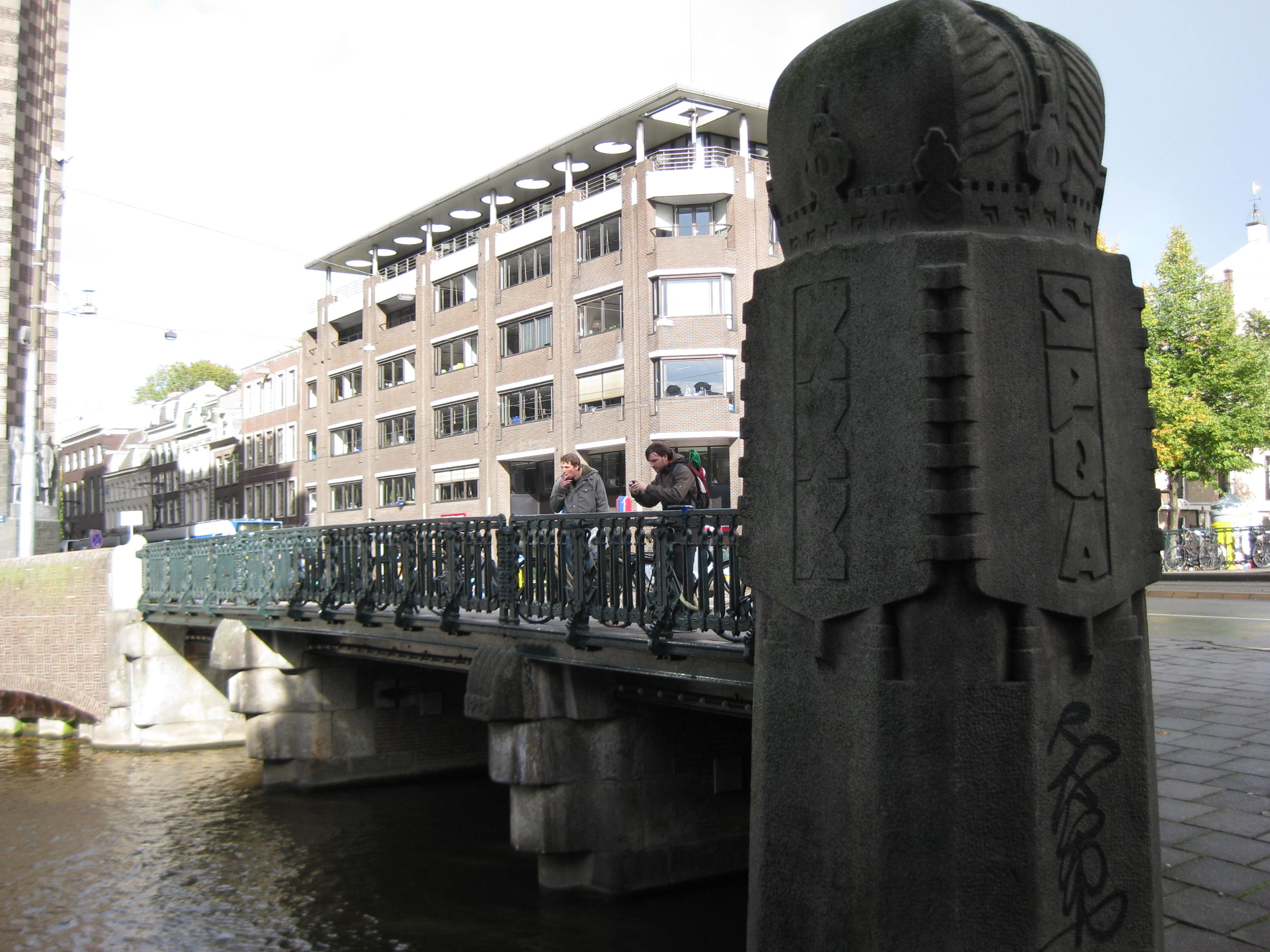 Brug 41 over de Keizersgracht in de Vijzelstraat, Amsterdam. Architect Piet Kramer. Sculptuur Hildo Krop